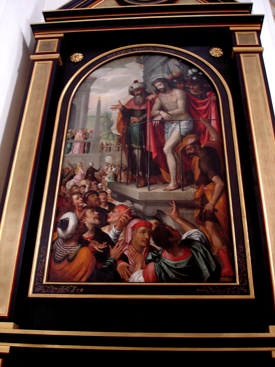 Ecce-Homo Altar im Liebfrauendom München